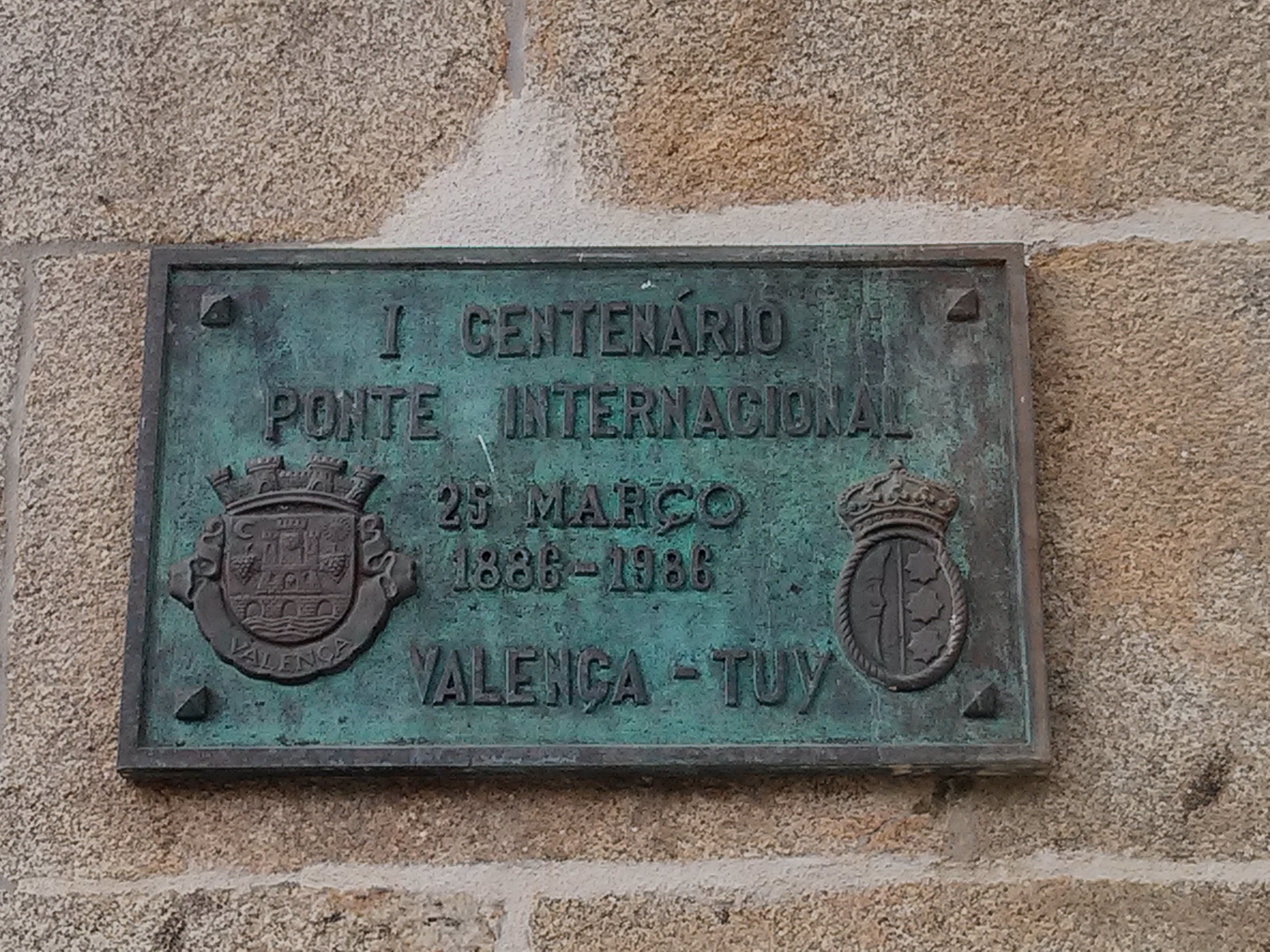 Plaque for the centenary of the bridge between Valença and Tui over the river Minho